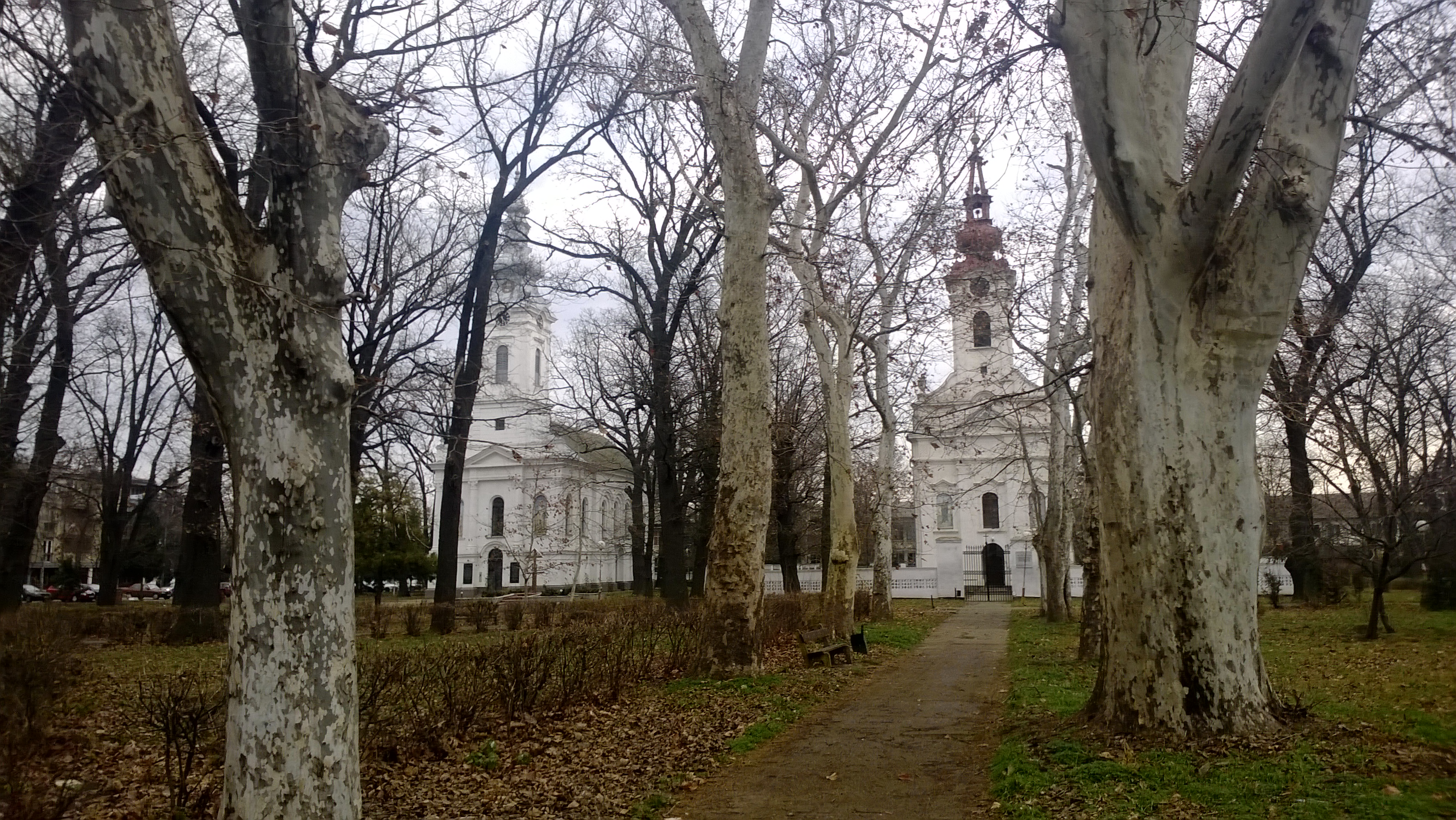 Alibunar, Serbia